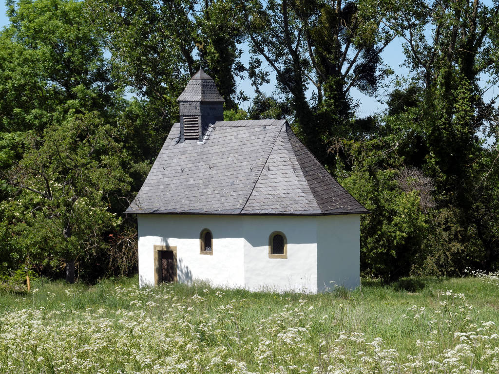 St. Sebastian (Weickede) – Diese Kapelle in Rüthen ist ein Baudenkmal.